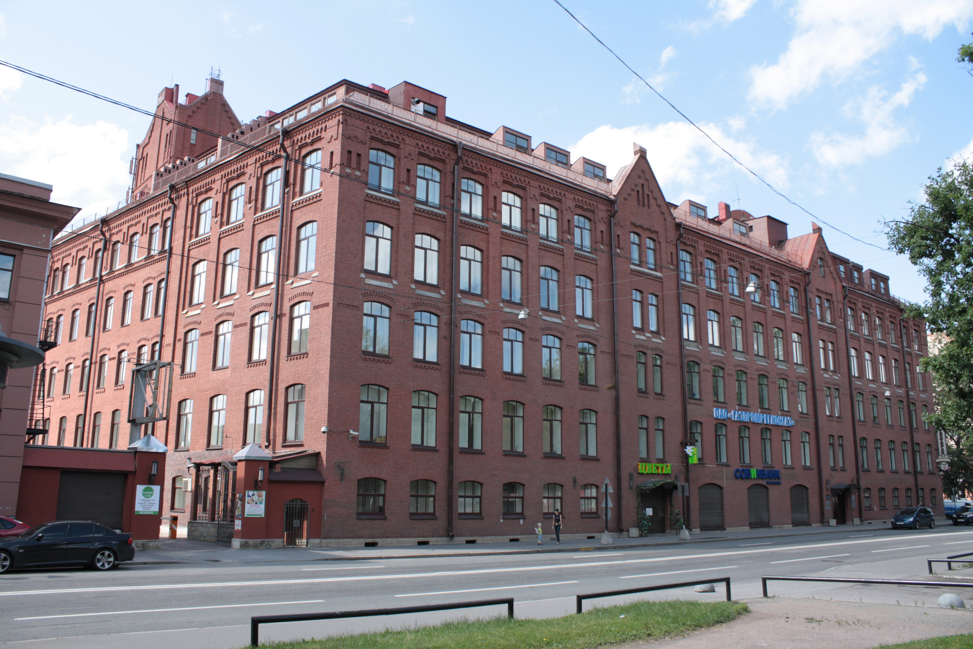 Санкт-Петербург. Б. Сампсониевский пр., 60 / Гельсингфорская ул., 2. Комплекс зданий телефонного завода русского акционерного общества «Л. М. Эриксон и Ко». 1899, 1910—1913. Архитектор Карл Шмидт